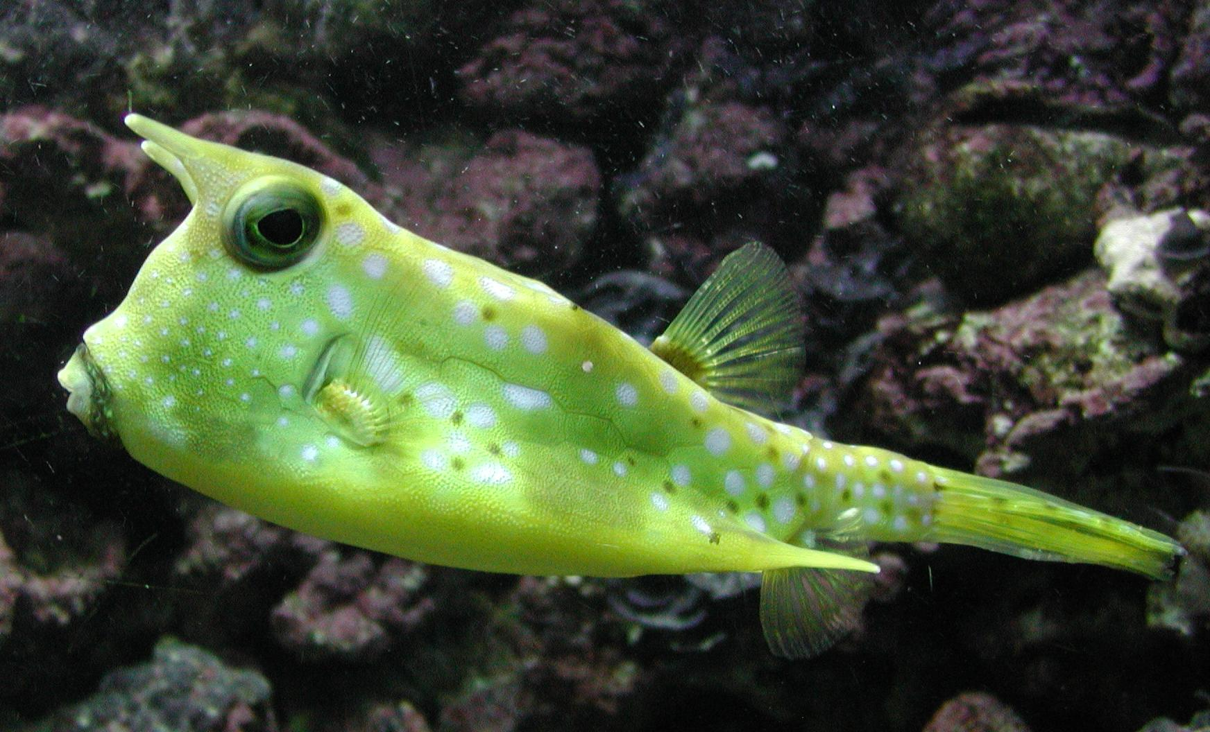 Kuhfisch, auch Langhornkofferfisch (Lactoria cornuta)